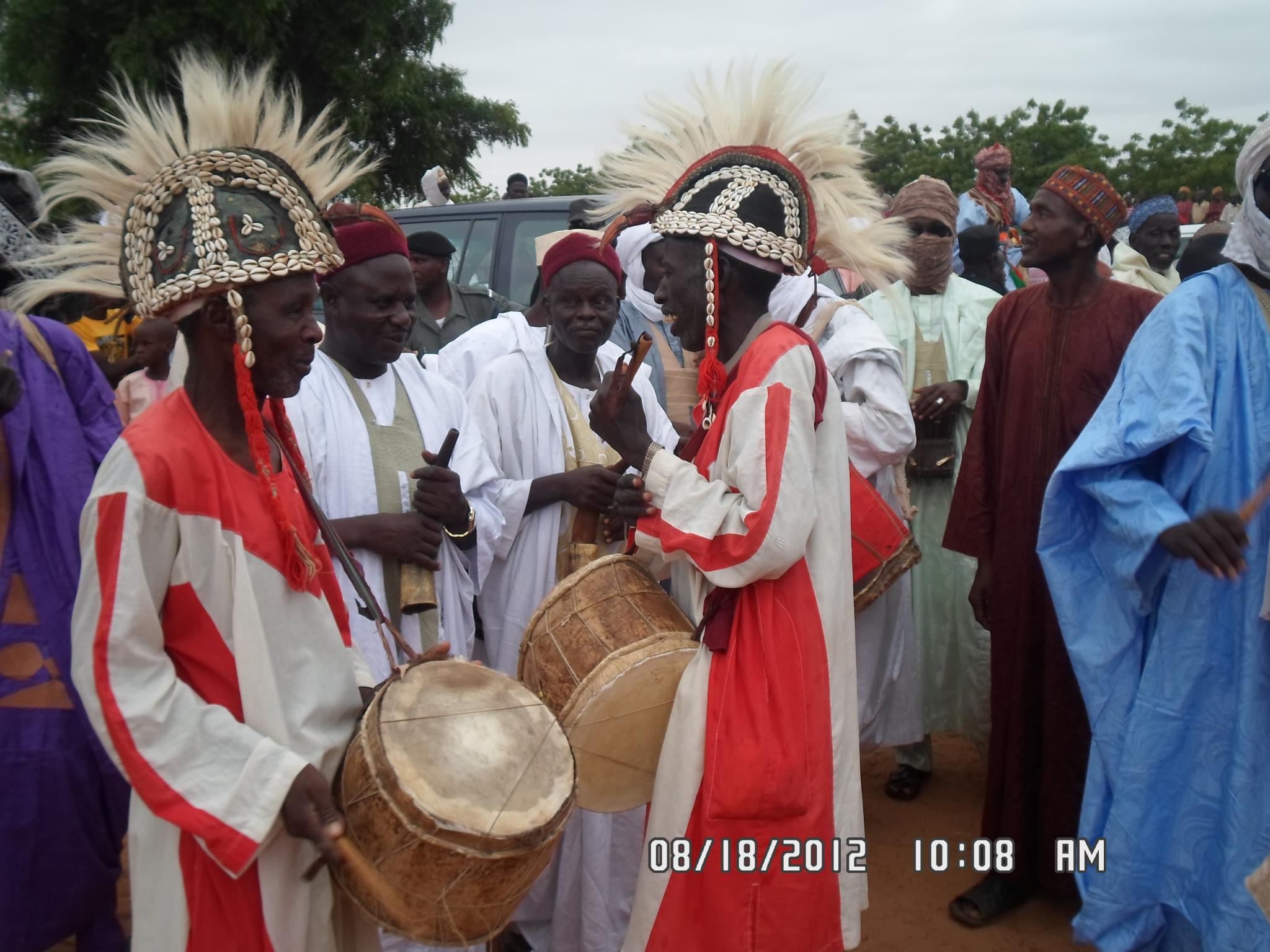 Zinder yan ganga